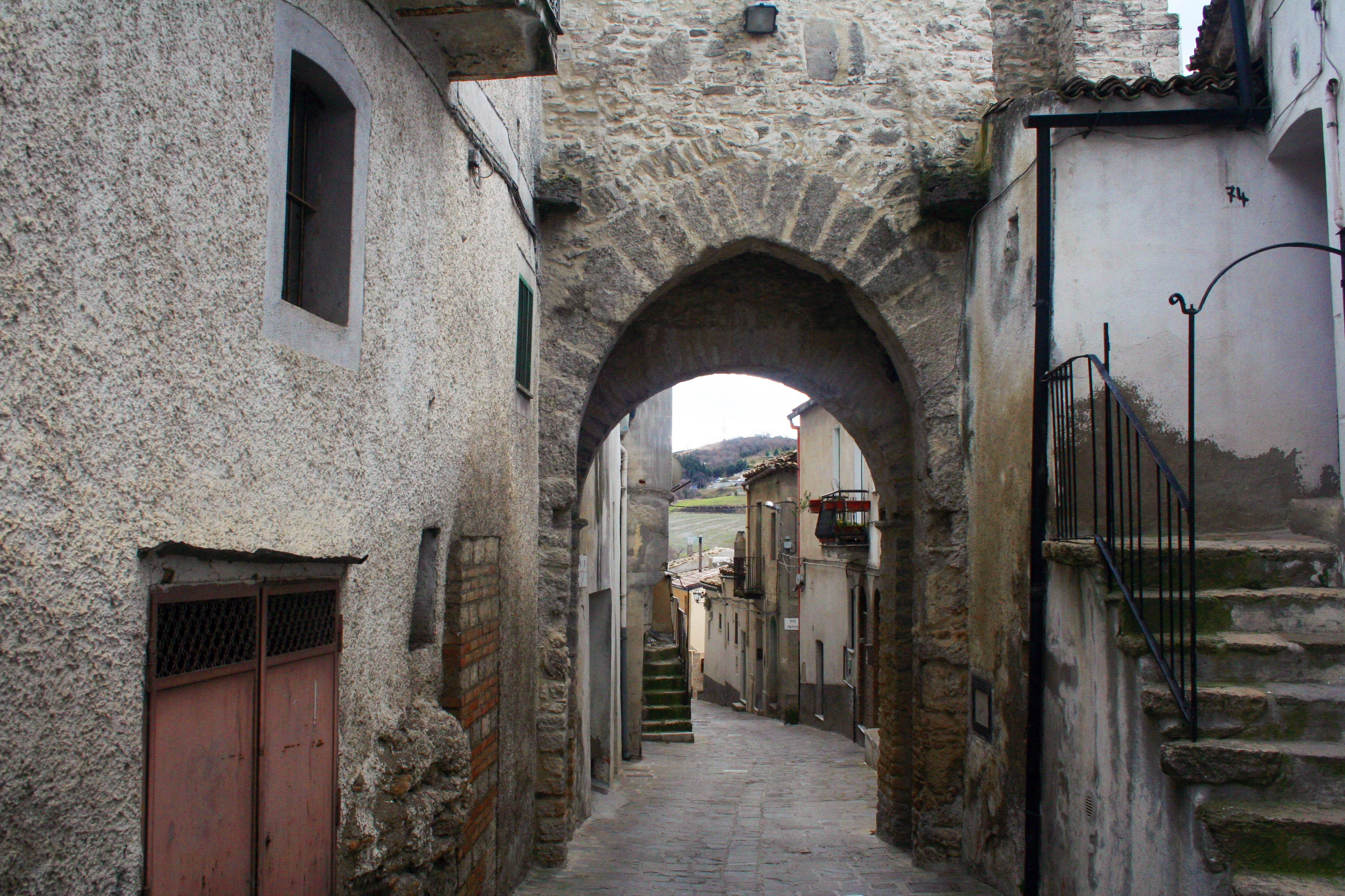 Porta Fontana, situata sull'omonima via, nel quartiere Piano